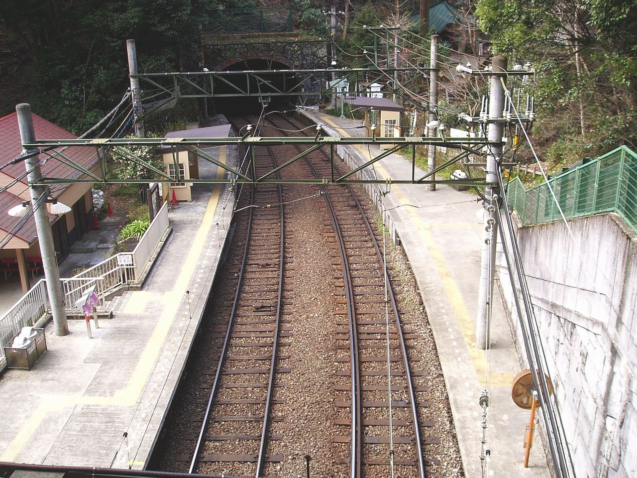 Tōnosawa Station, on the Hakone Tozan Line, Hakone, Kanagawaja:塔ノ沢駅